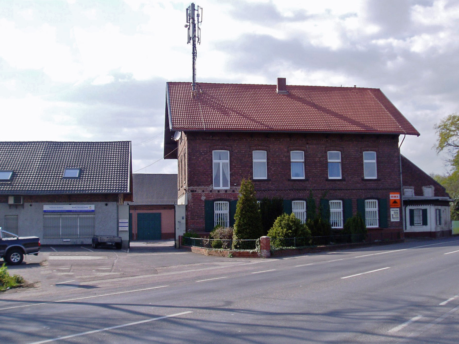 Wohngebäude des ehemaligen Gutshofs Plantage in Köln-Ostheim